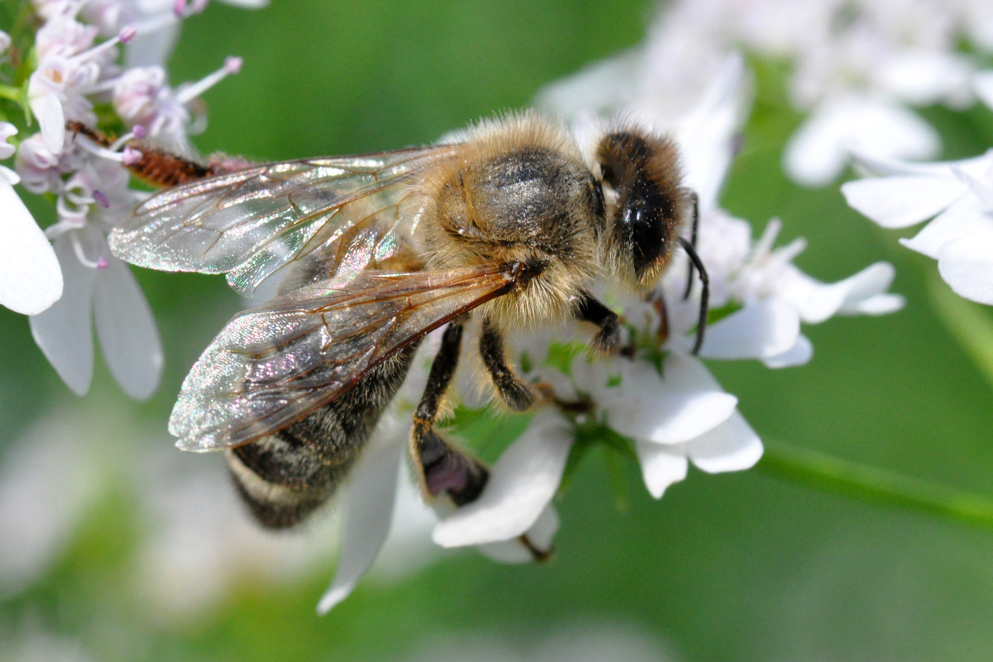 Apoidea on Coriandrum sativum